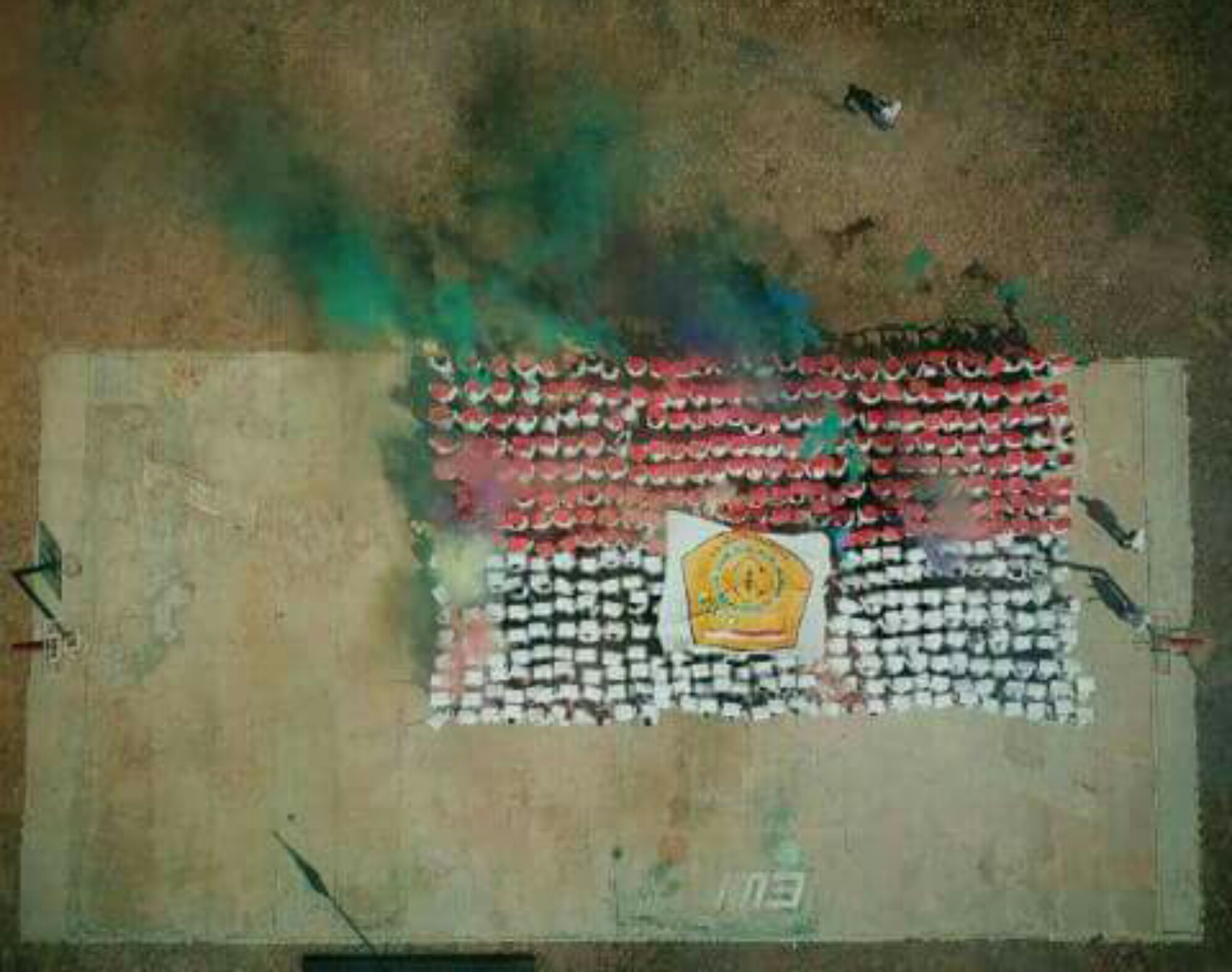 Alumni SMK Negeri 1 Cikampek